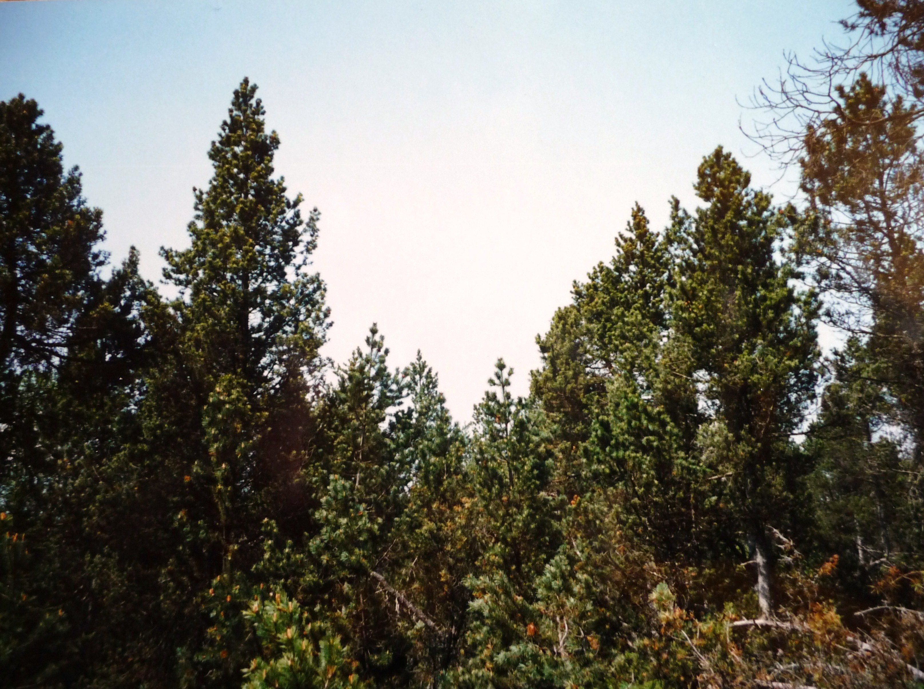 Das Hochmoor Todtenau bei Dösingerried im Bayerischen Wald mit den charakteristischen Spirken